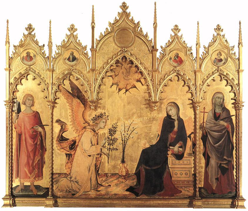 Die Darstellung breitet sich unter fünf vergoldeten Spitzbögen aus und ist noch ganz im Stil der hochgotischen Schönlinigkeit gehalten. Ein goldenes Spruchband liegt zwischen dem Engel Gabriel und Maria, die über die Frage nachdenkt.